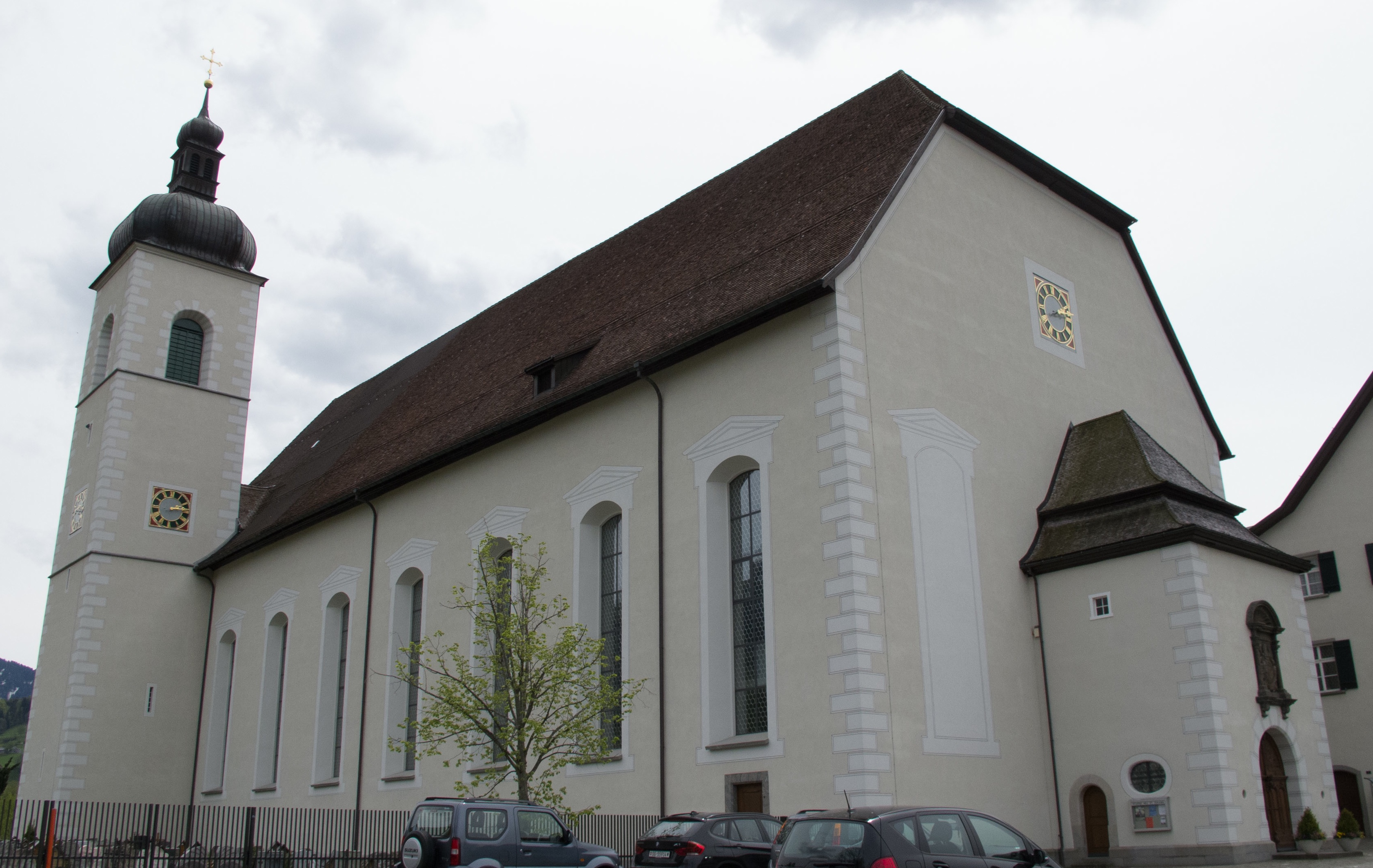 Neu St. Johann: Ehemaliges Benediktinerkloster